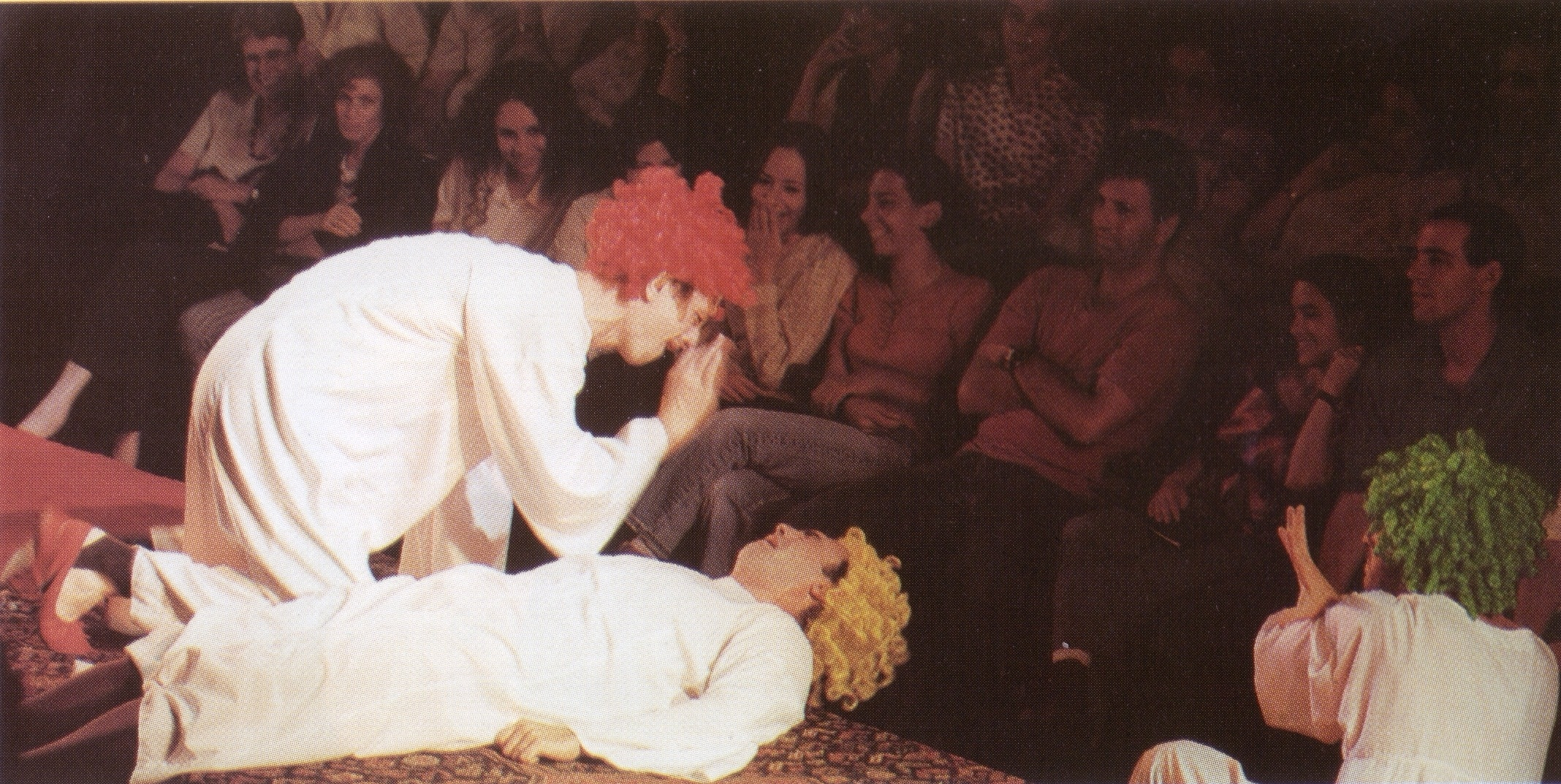 רוזנקרנץ וגילדנשטרן מתים בתיאטרון גשר